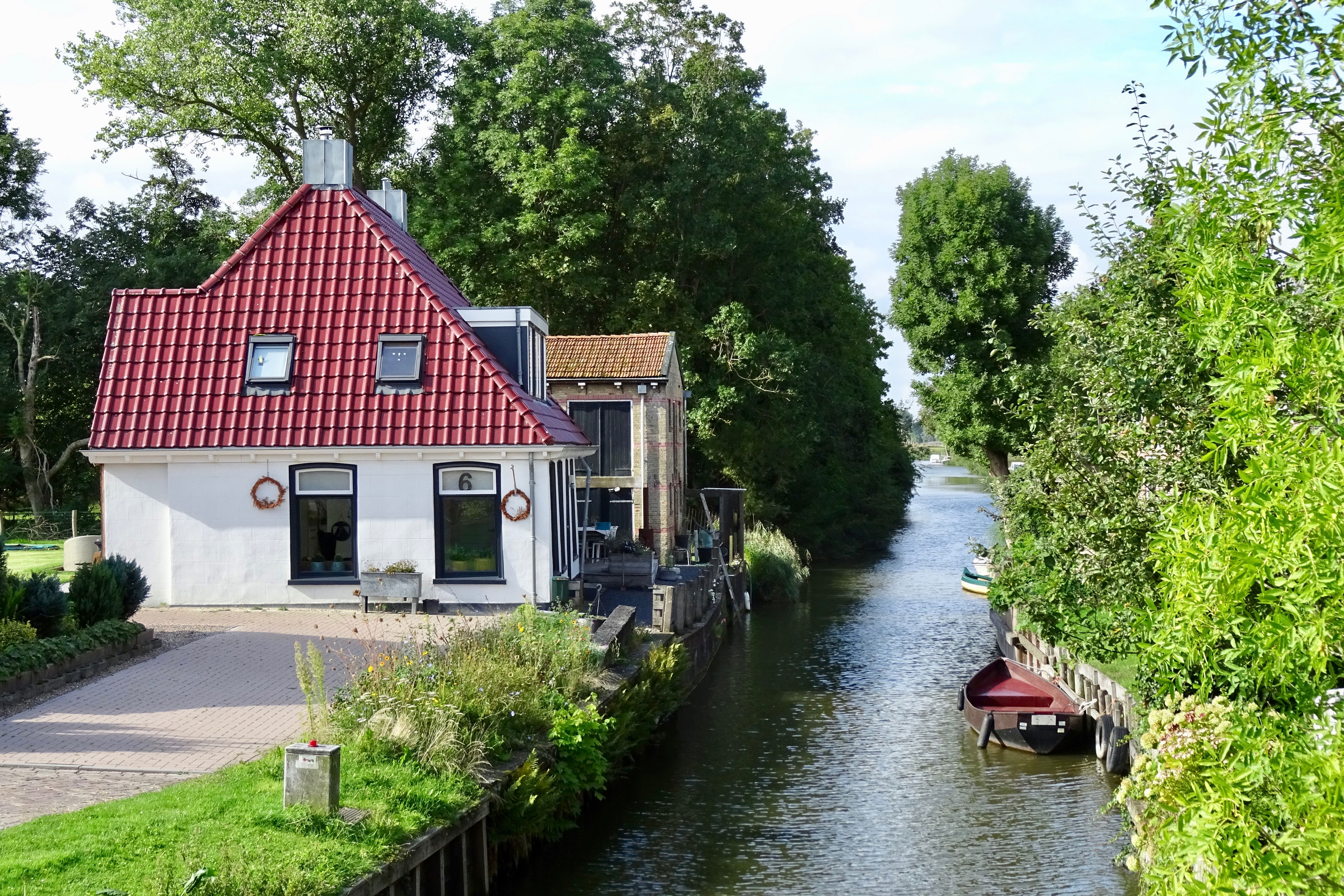 De Arumervaart in Arum